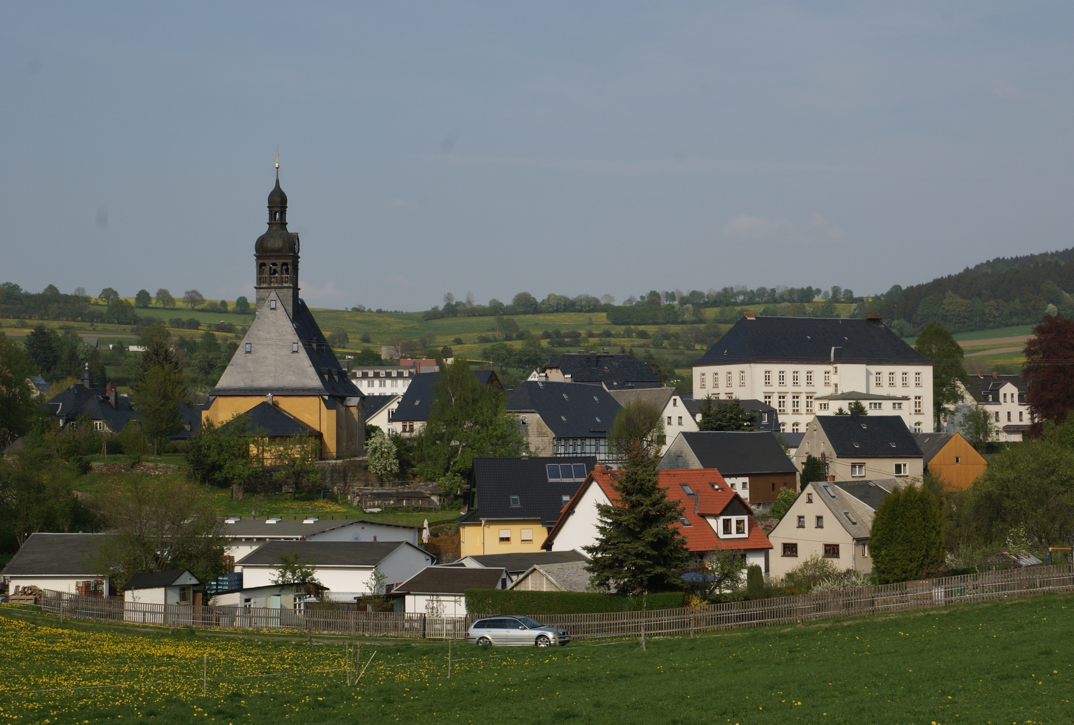 Kirche und Grundschule Großolbersdorf